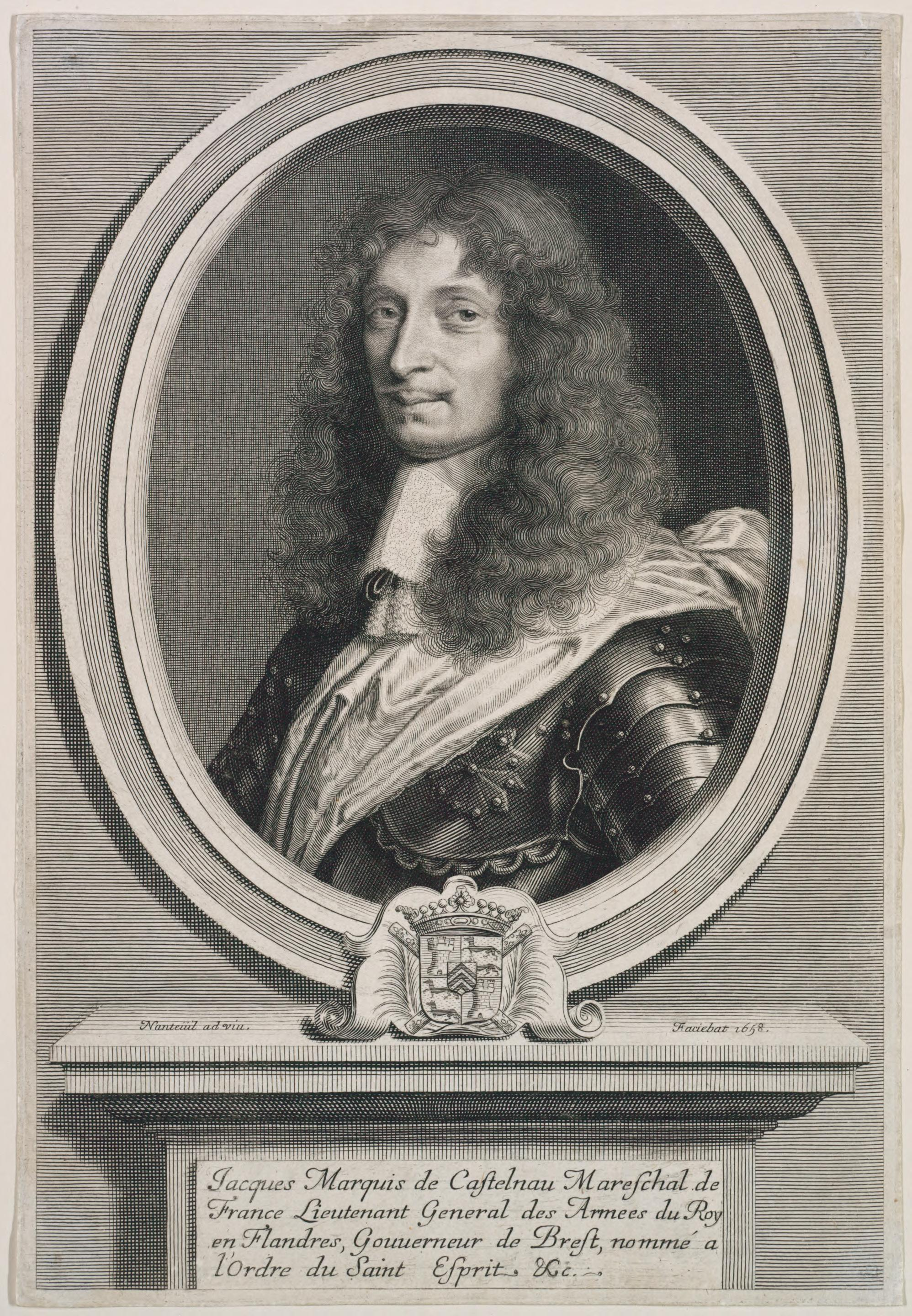 Porträt Jacques de Mauvissière, Marquis von Castelnau, Marschall von Frankreich